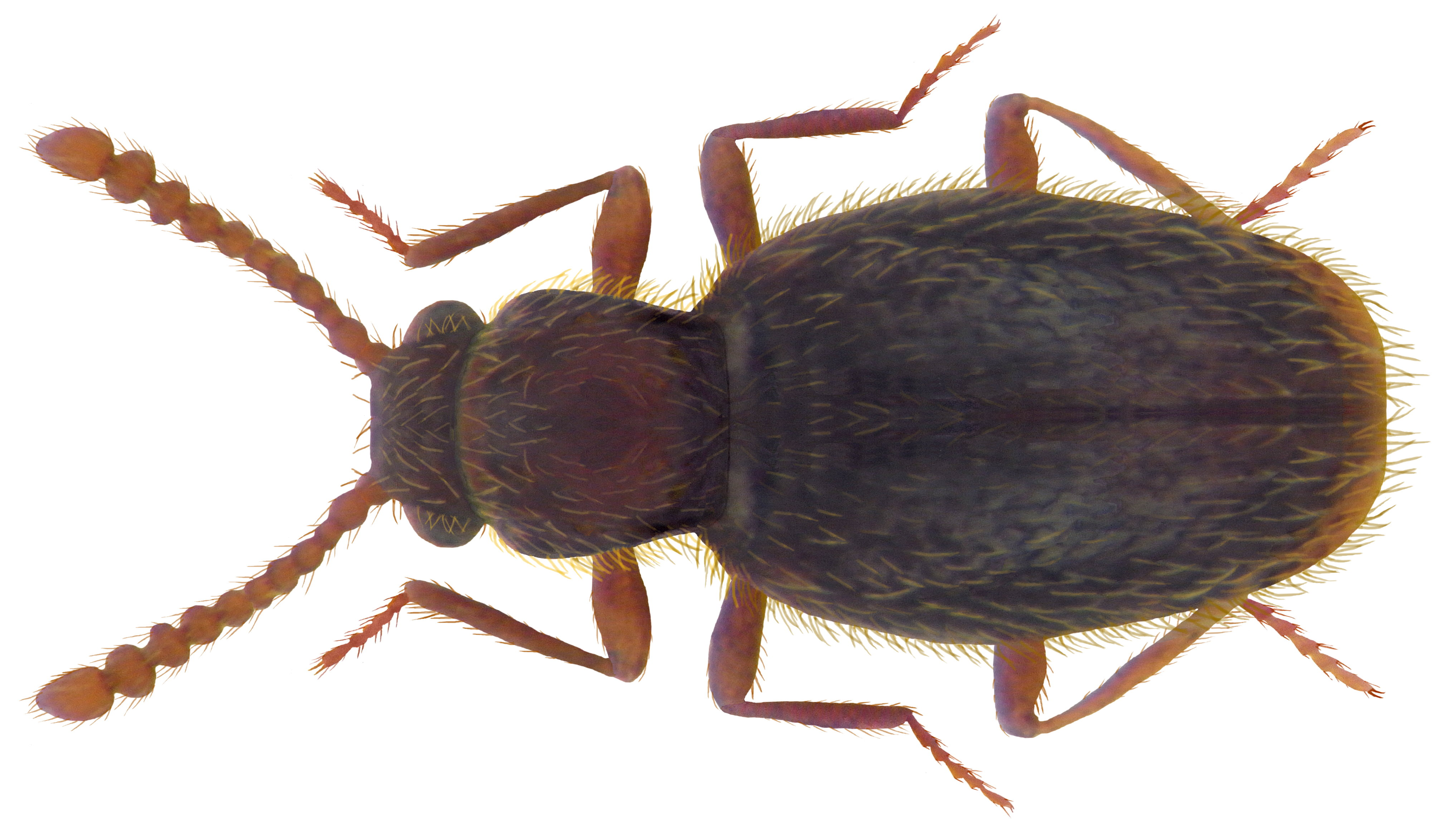 Familie: Scydmaenidae Groesse: 1,15-1,3 mm Verbreitung: Nord- und Mitteleuropa, Teile Südeuropas Ökologie: terricol in Waldstreu, in Moosrasen und Humus Fundort: Germania, Hessen, Harz, Athenstedt, 1988 det.Meybohm Photo: U.Schmidt, 2009